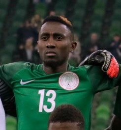 Nigeria national football team